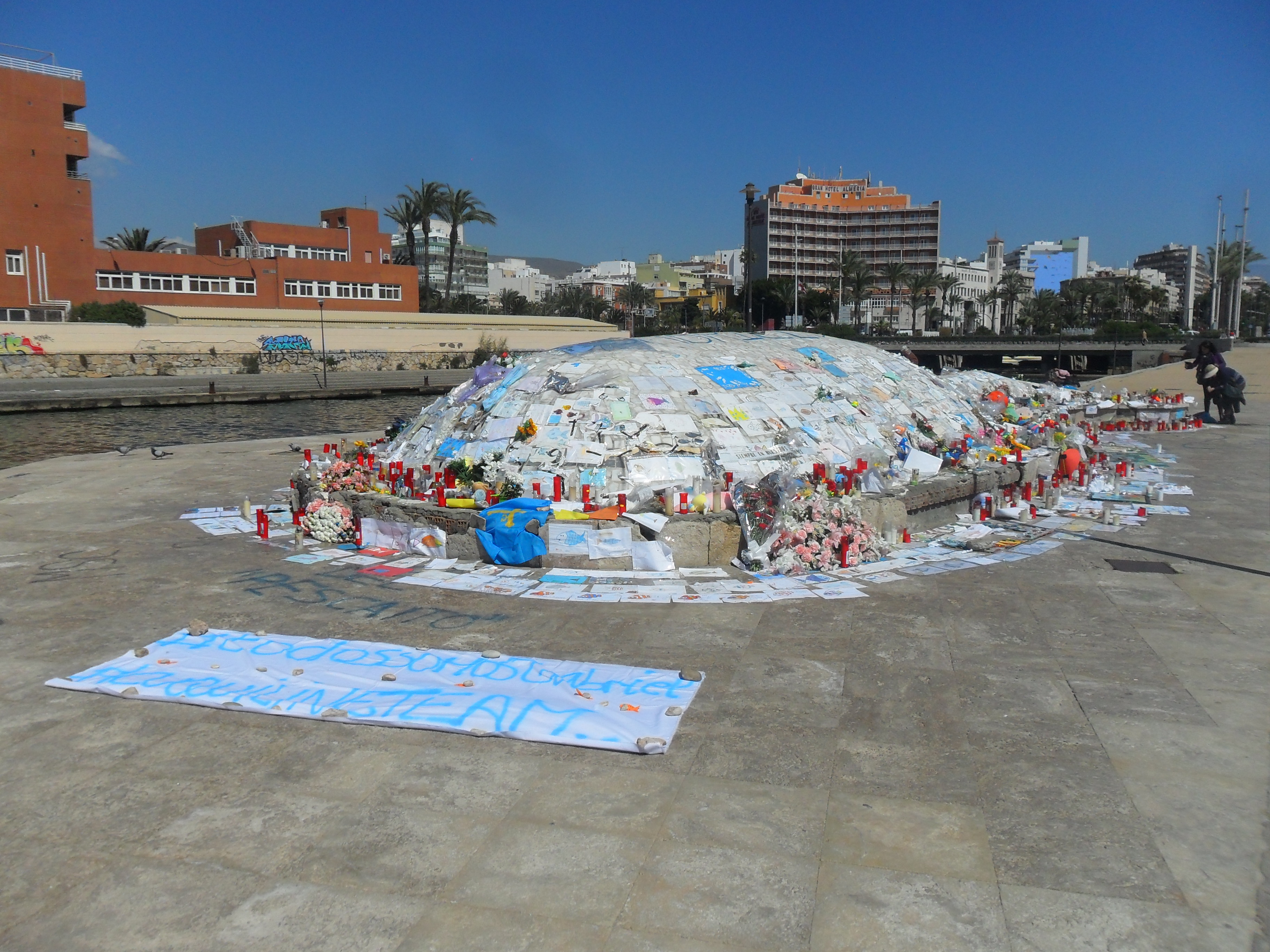 Homenaje a Gabriel Cruz en "La Ballena" de Almería